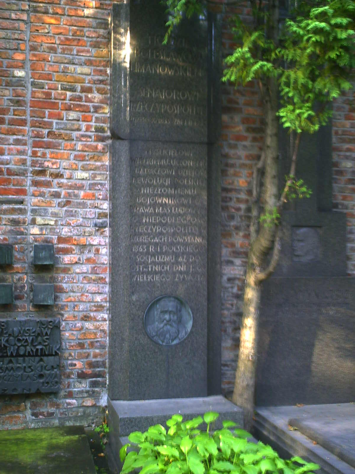 Bolesław Limanowski's grave on Powązki cementery in Warsaw.